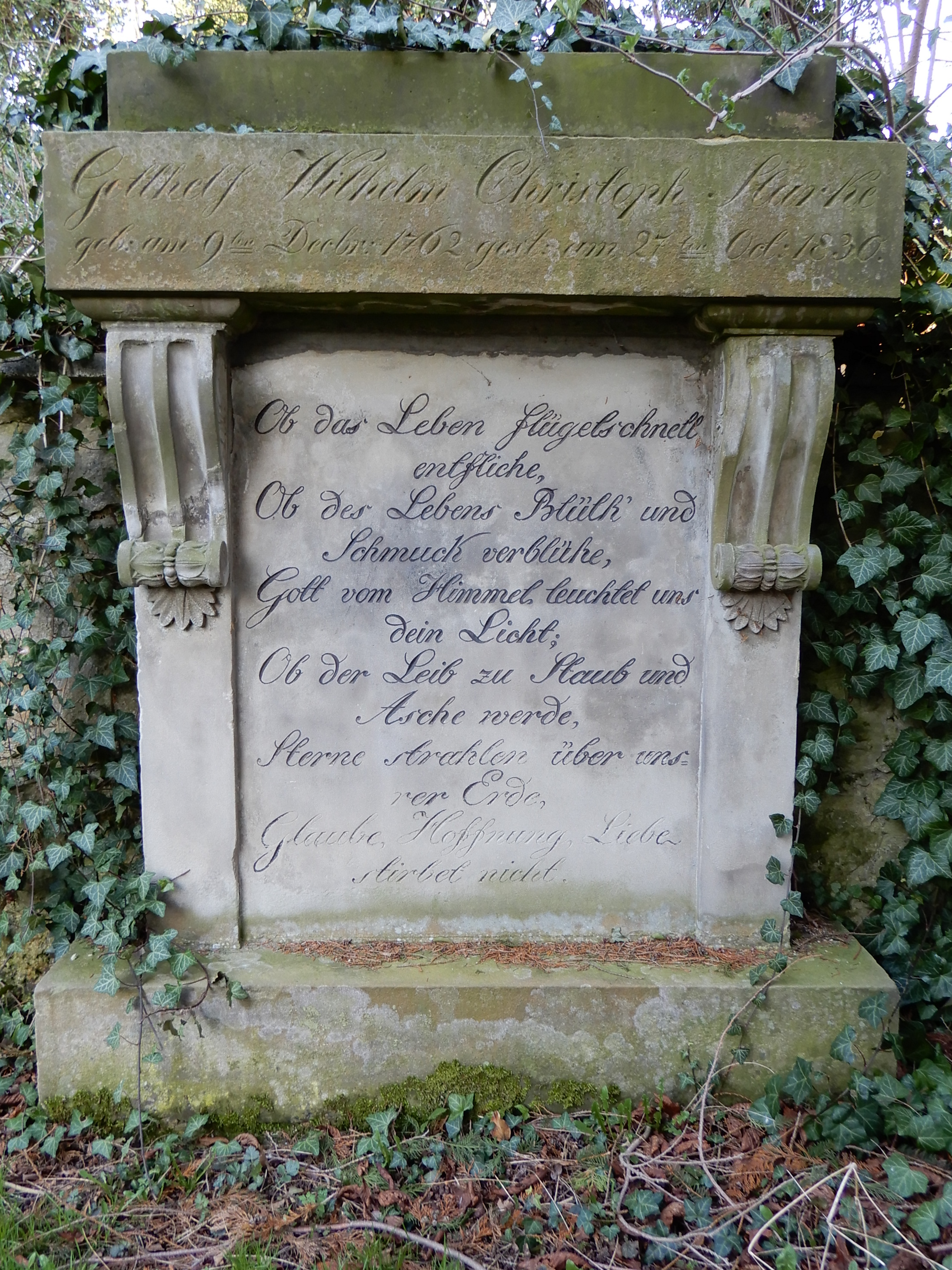 Grabmal auf dem Friedhof Ballenstedt